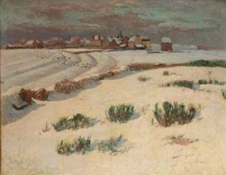 Henry MOret : Île de Groix sous la neige (huile sur toile, 1892, 73 x 92 cm)